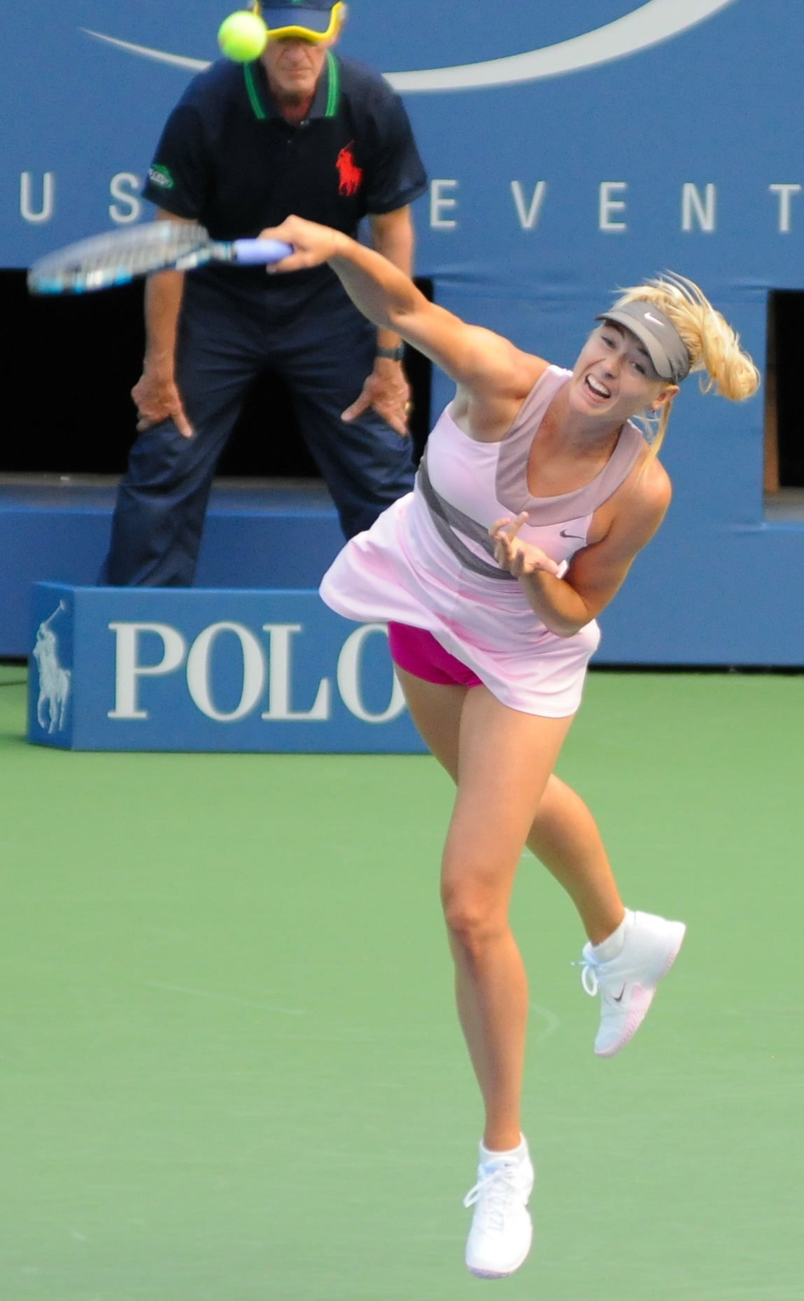 Maria Sharapova at US Open 2012.